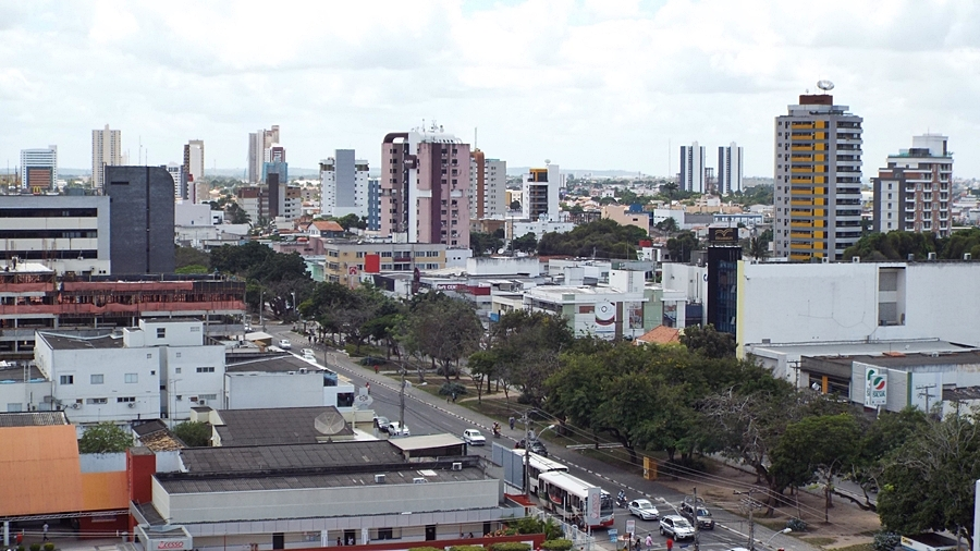 Panoramica de feira de santana